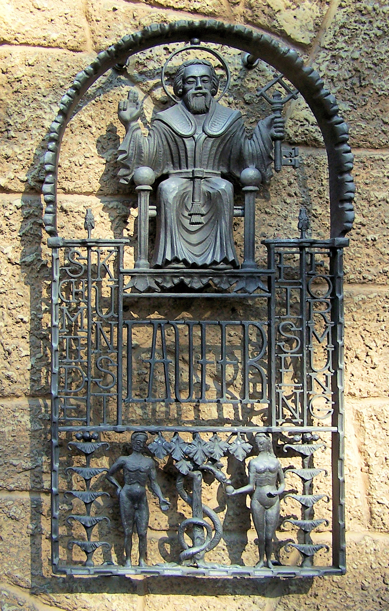 Wandschmuck an der Fassade des Wohnhauses von Professor Laufer in Eisenach, Frauenplan 20.